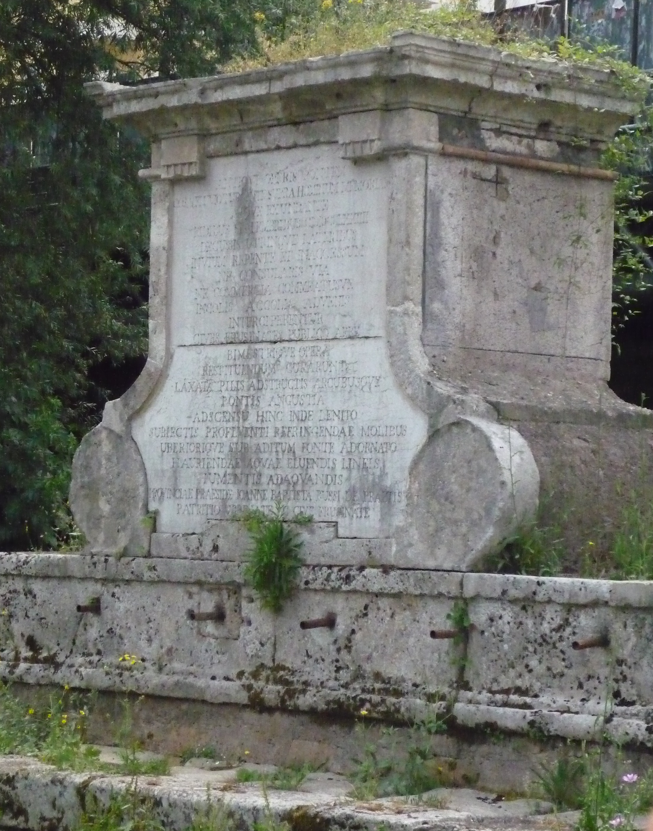 fontana bussi frosinone